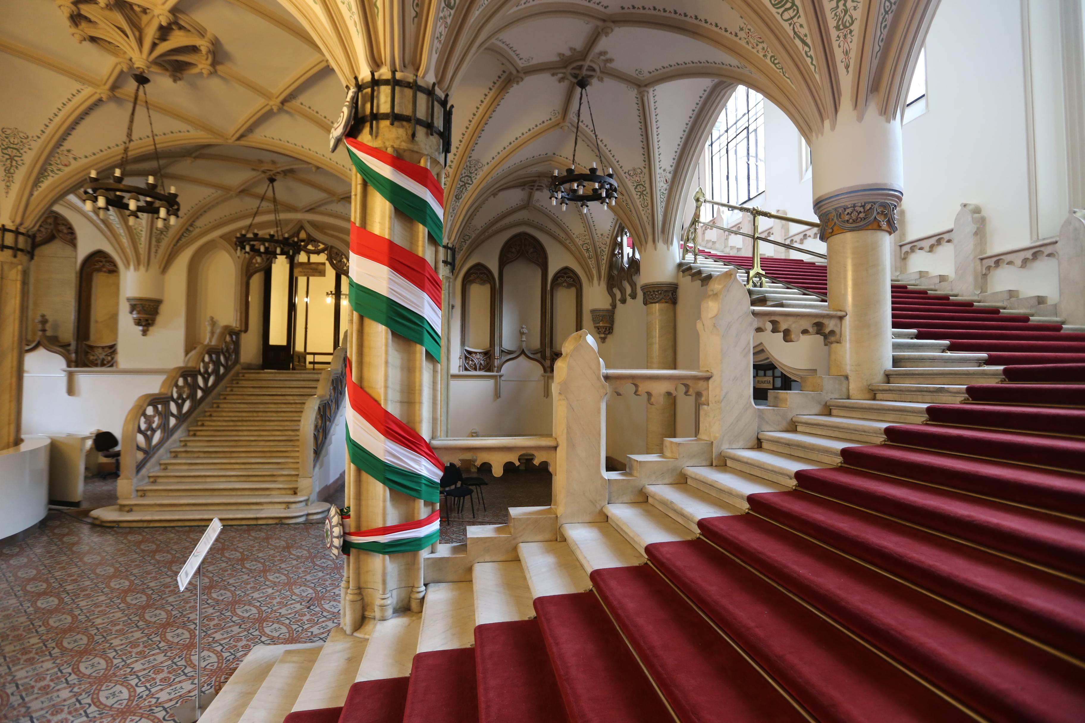 Az egykori Pénzügyminisztérium épülete, Budapest I. kerület, Szentháromság tér This is a photo of a monument in Hungary. Identifier: 144